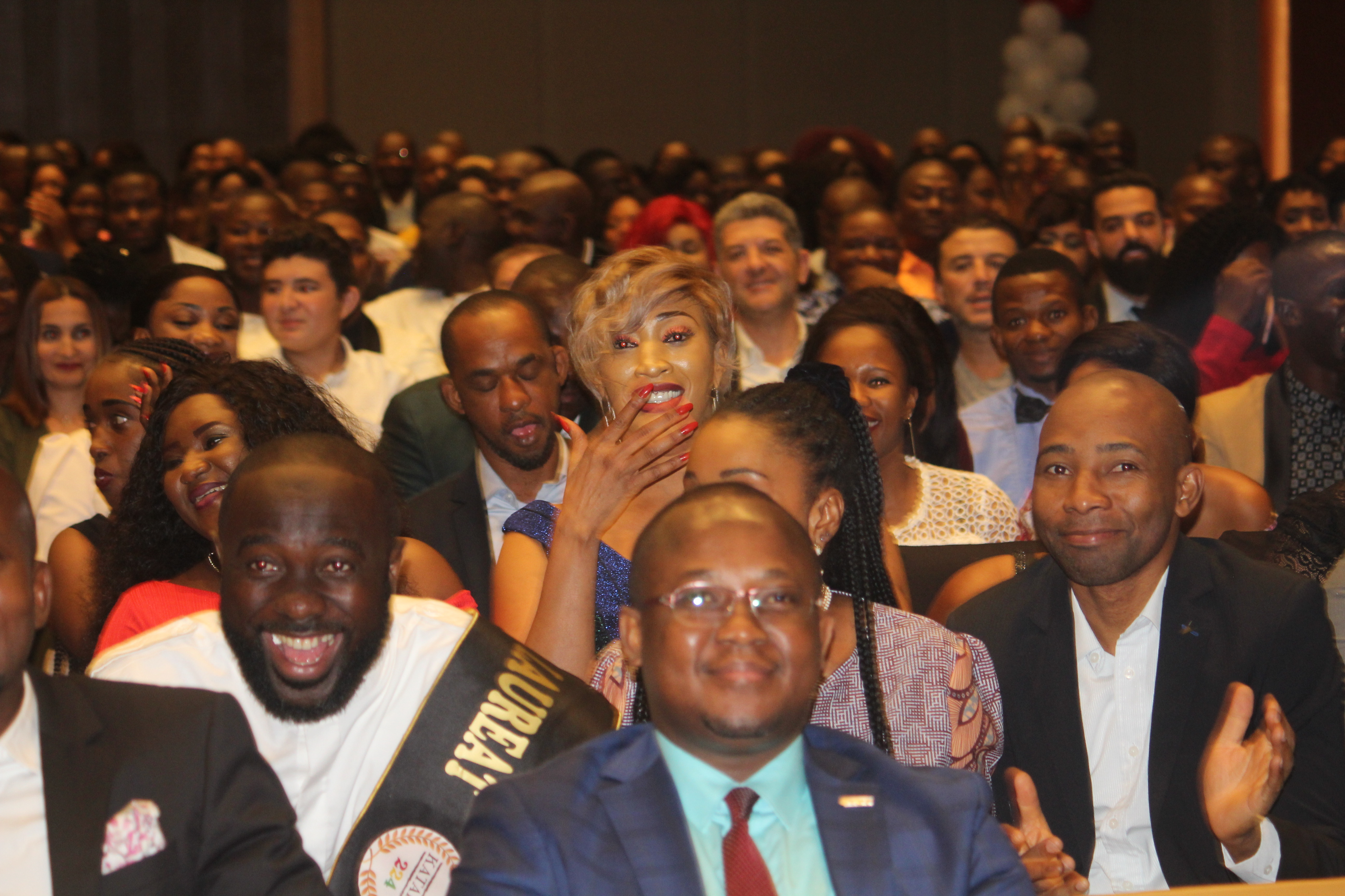 Participants katala 224 2019 a sheraton grand conakry